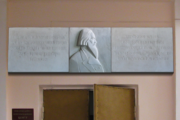 Memortabulo omaĝe al Vladimir Gernet en la instituto de vinberkultivado kaj vinfarado "V. Je. Tairov"